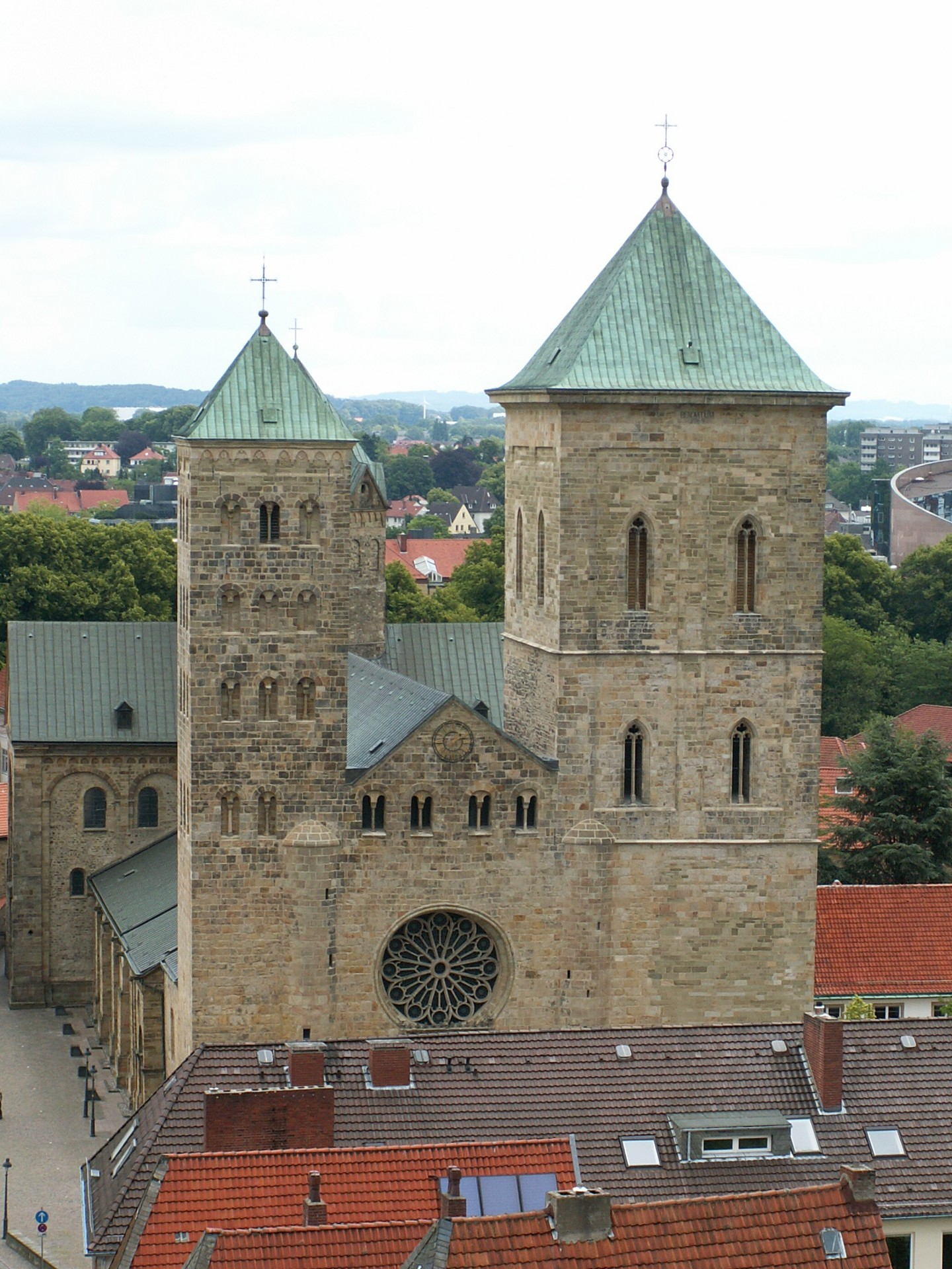 Osnabrücker Dom, Ansicht von Westen, aufgenommen vom Turm der Marienkirche